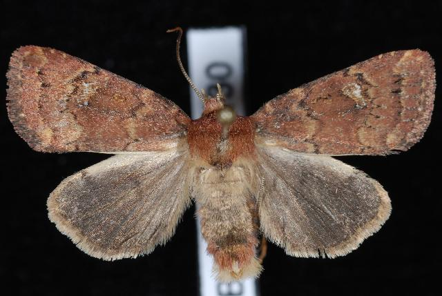 Pseudorthodes irrorata